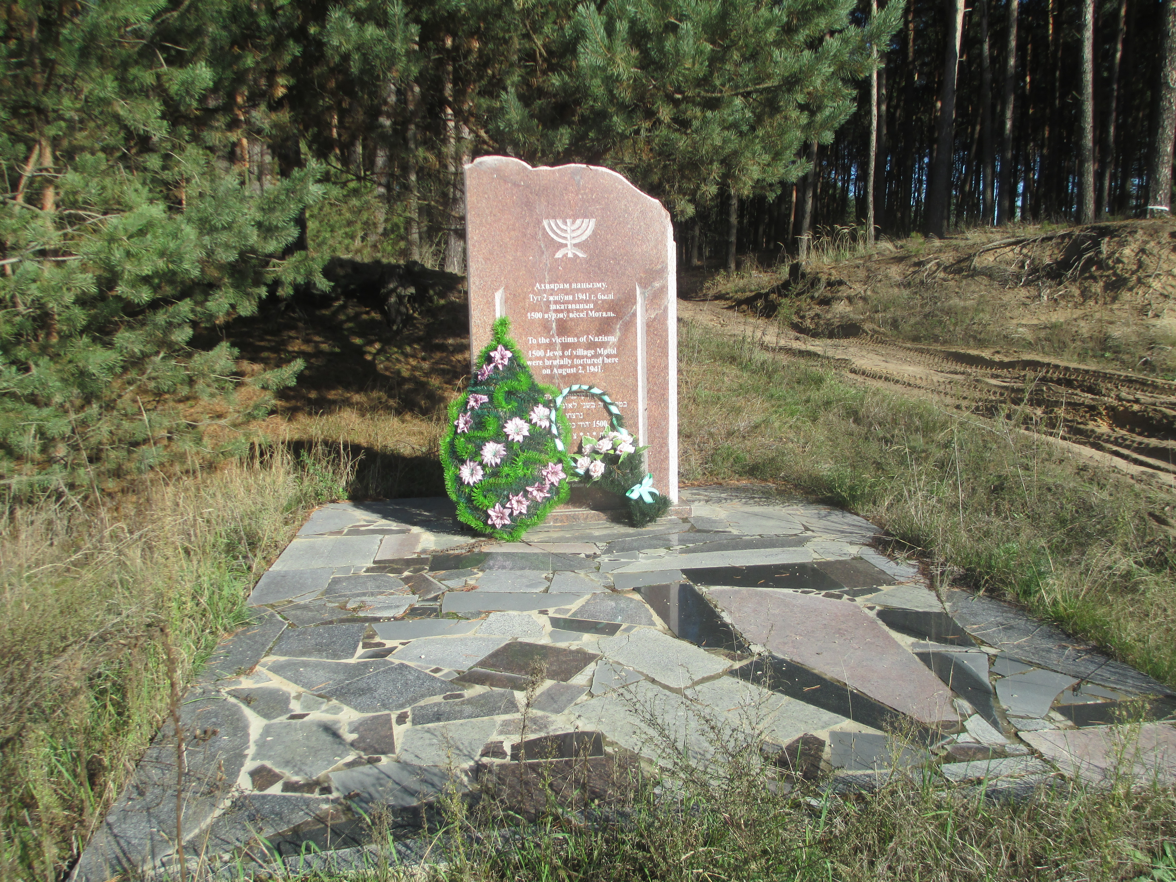 Урочище Гай